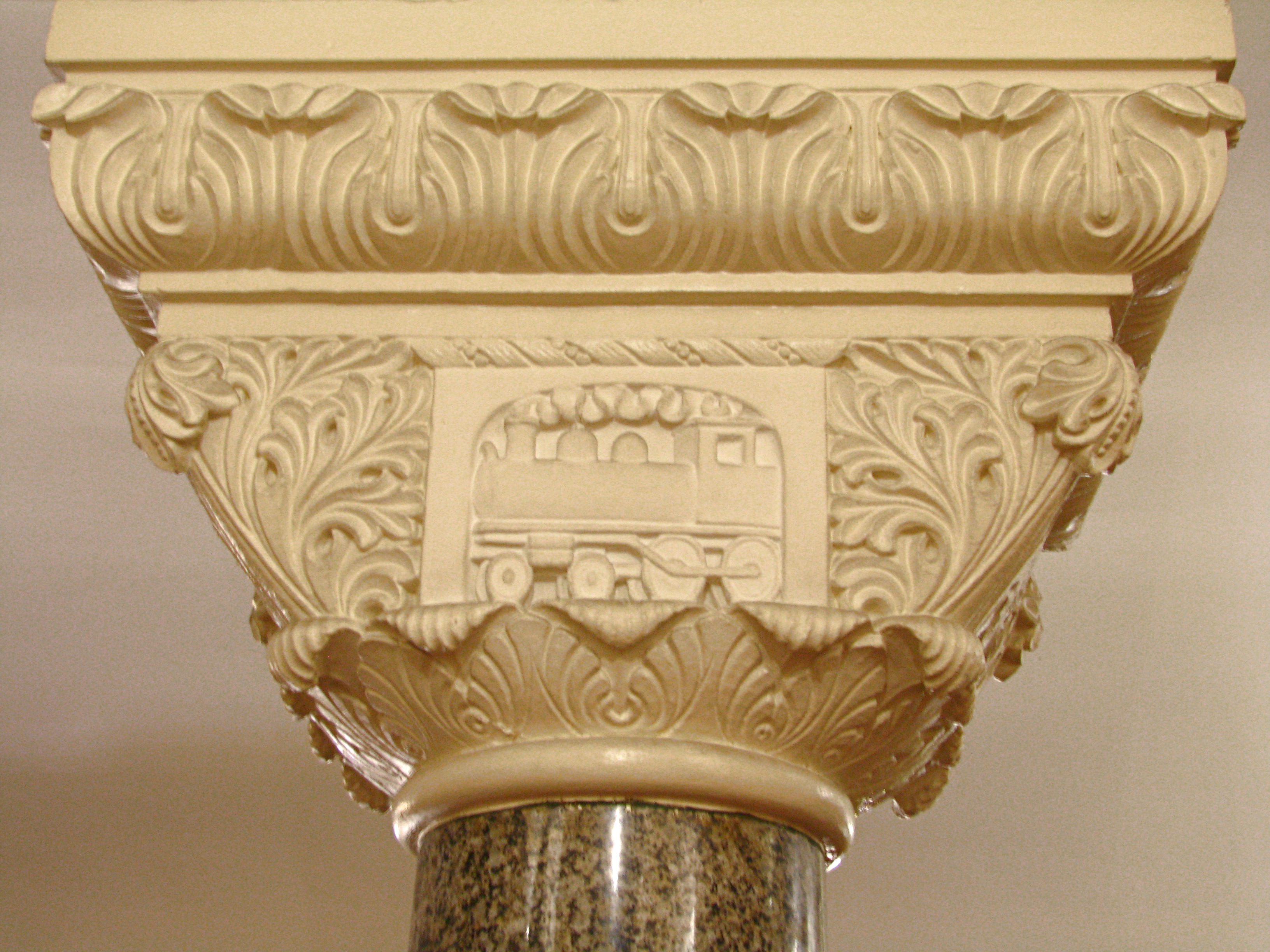 Détail. Hall d'entrée, salle de colonnades. Chacun des chapiteaux centraux représentent deux illustrations des moyens de transport ou de télécommunication. .